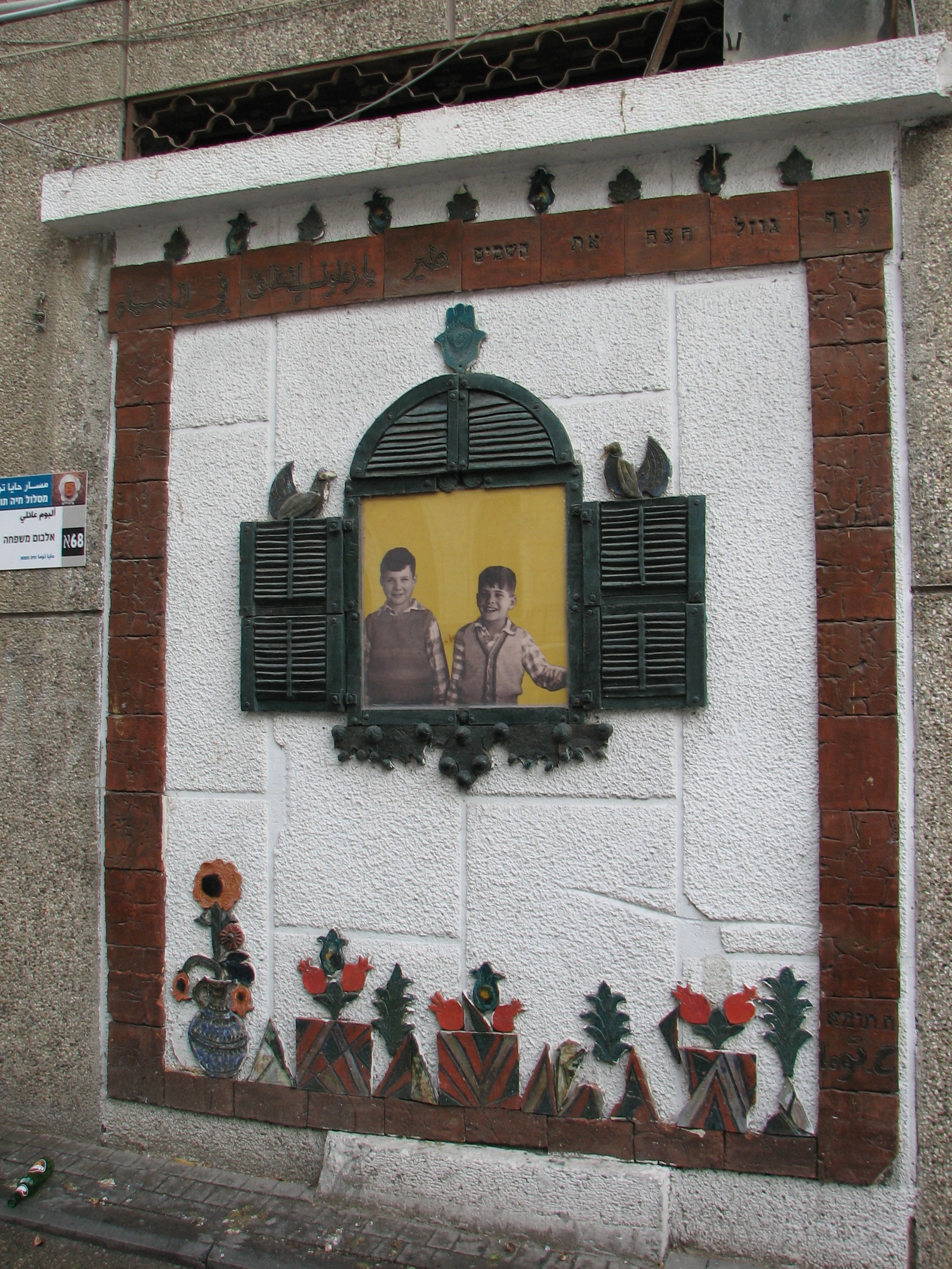 Holiday of Holidays festiva, Haifa Israel החג של החגים הוא פסטיבל הנערך בעיר חיפה מדי שנה, במהלך חודש דצמבר יצירה של האומנית חוה גרבר אשתו של אמיל תומא במסגרת מסלול אמיל תומא. היצירה נקראת אלבום משפחה, תמונת ילדי משפחת תומא